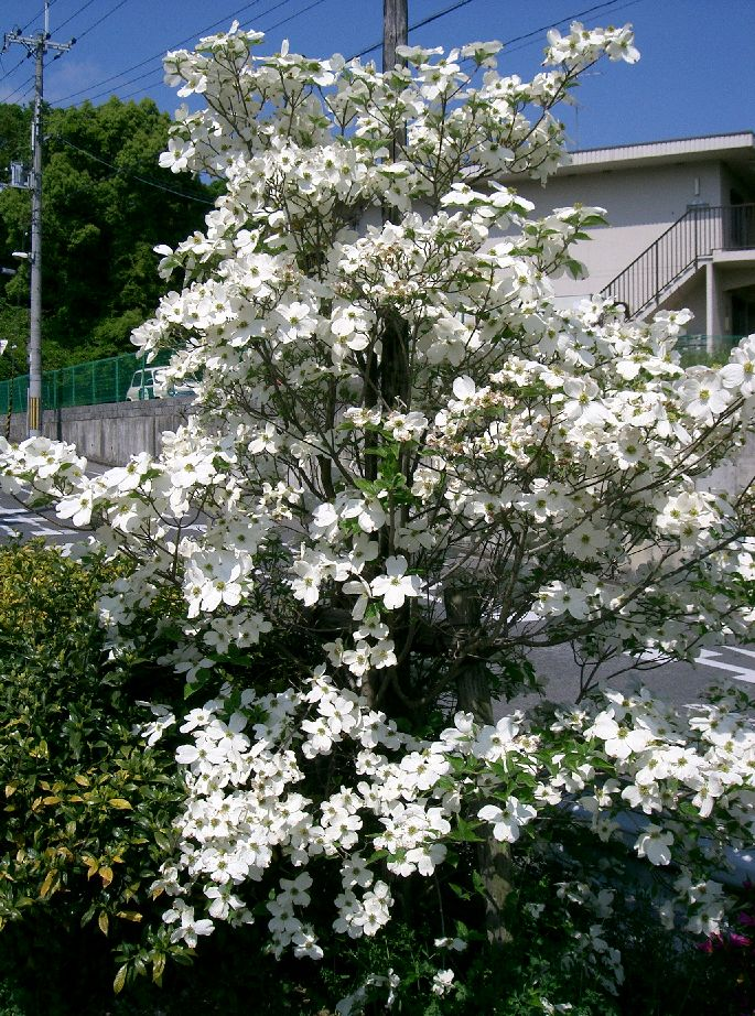 Benthamidia florida